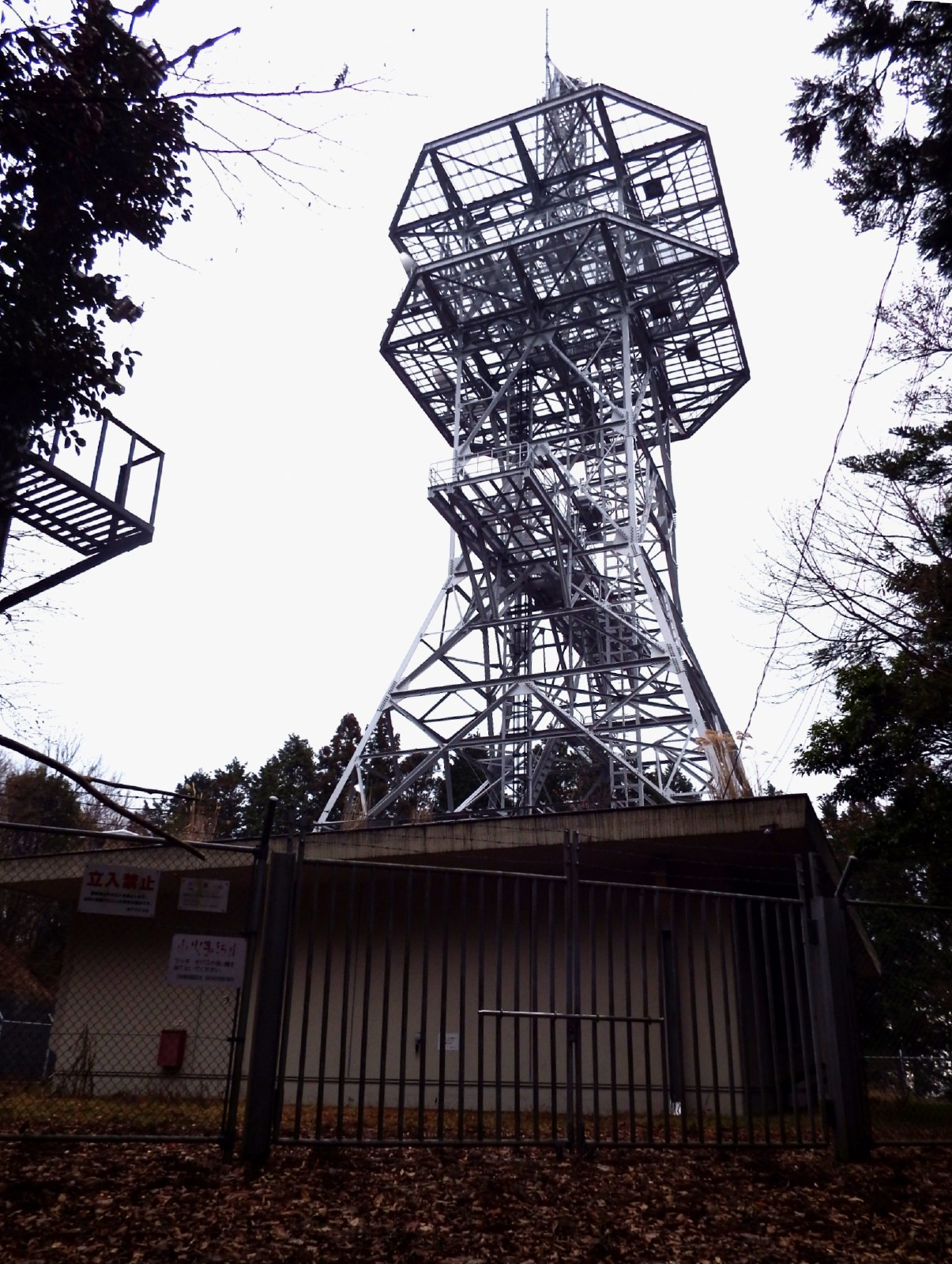 大滝山の山頂の近くにあるNTTドコモ高松統制無線中継所